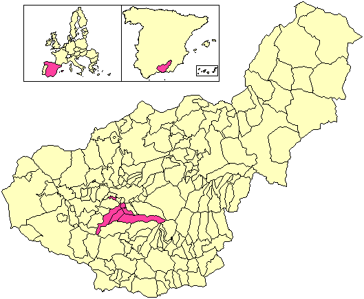 Situación de la Mancomunidad del Río Dílar respecto a la provincia de Granada, en España.